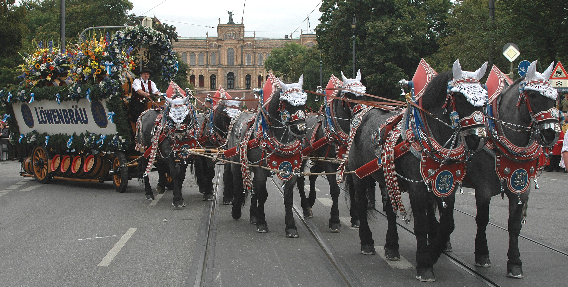 Löwenbräugespann 2008